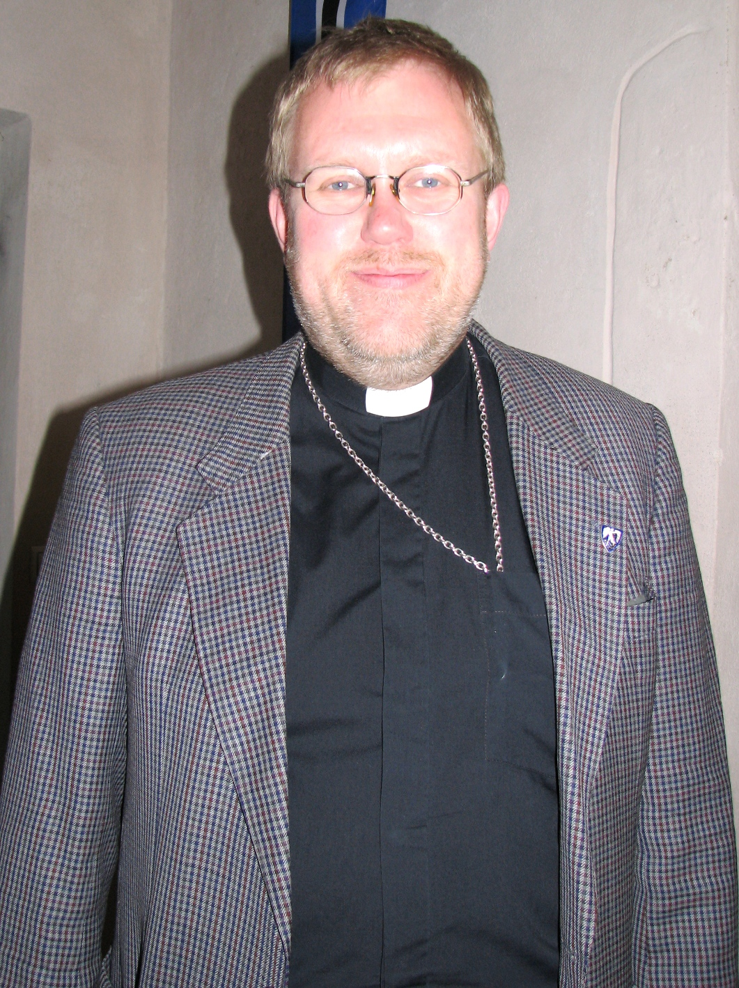 Patrik Göransson Tallinna Rootsi-Mihkli kirikus